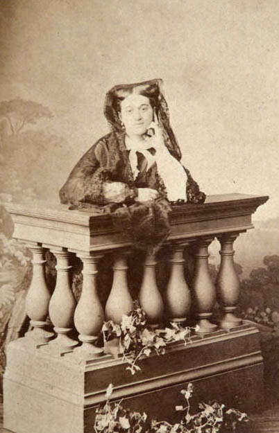 Aurélie Soubiran, princesse Ghika (1820-1904), femme de lettres. Photographie-carte de visite par Levitsky, Paris, 1863